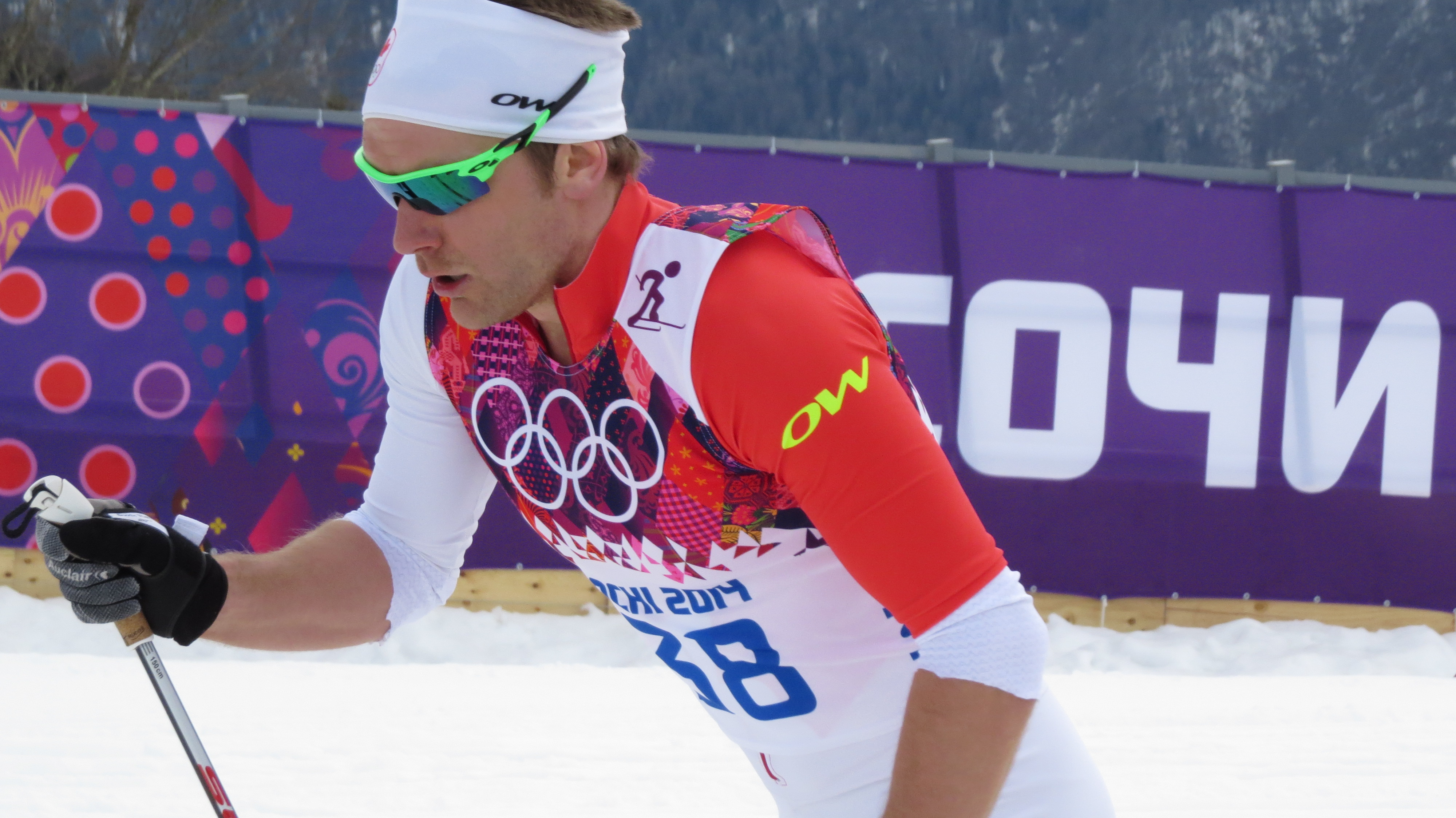 Лыжные гонки на зимних Олимпийских играх 2014 — 15 км классическим стилем (мужчины)